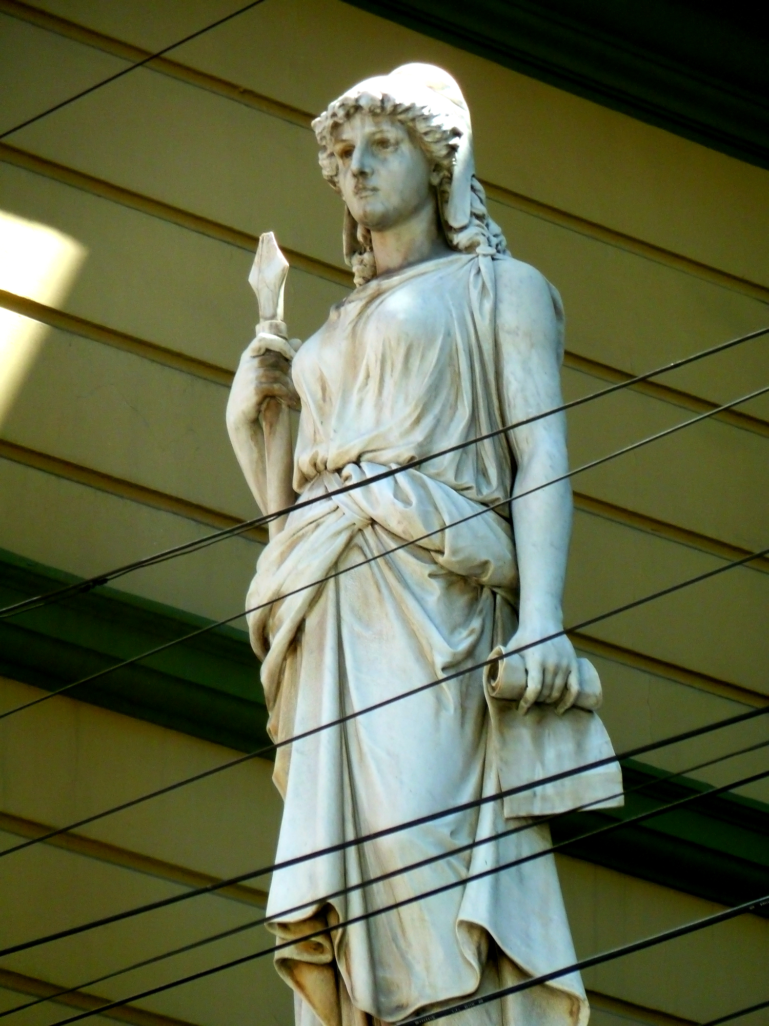 La Libertad This medium shows the protected monument with the number L/00-245 in Bolivia.